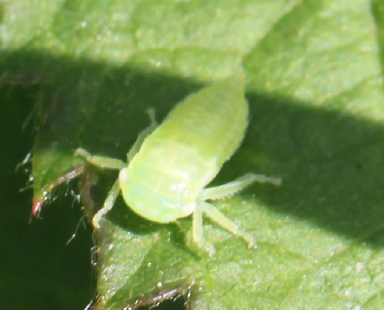 Zikadennymphe, vermutlich von der Punktierten Graszirpe (Graphocraerus ventralis), am 24. Mai 2019 in Walldorf/Baden